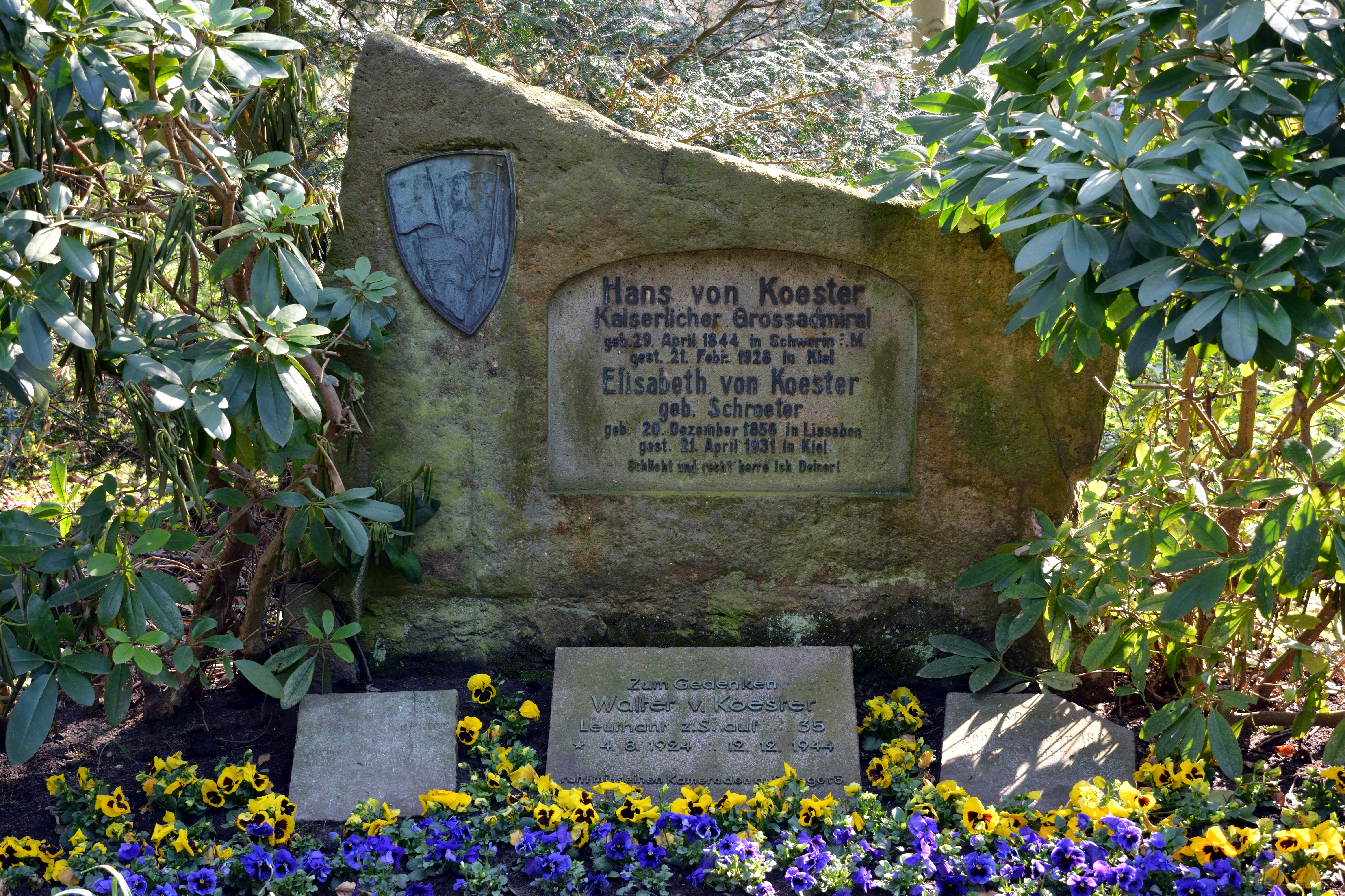 Impressionen vom Nordfriedhof in Kiel: Grab von Hans von Koester